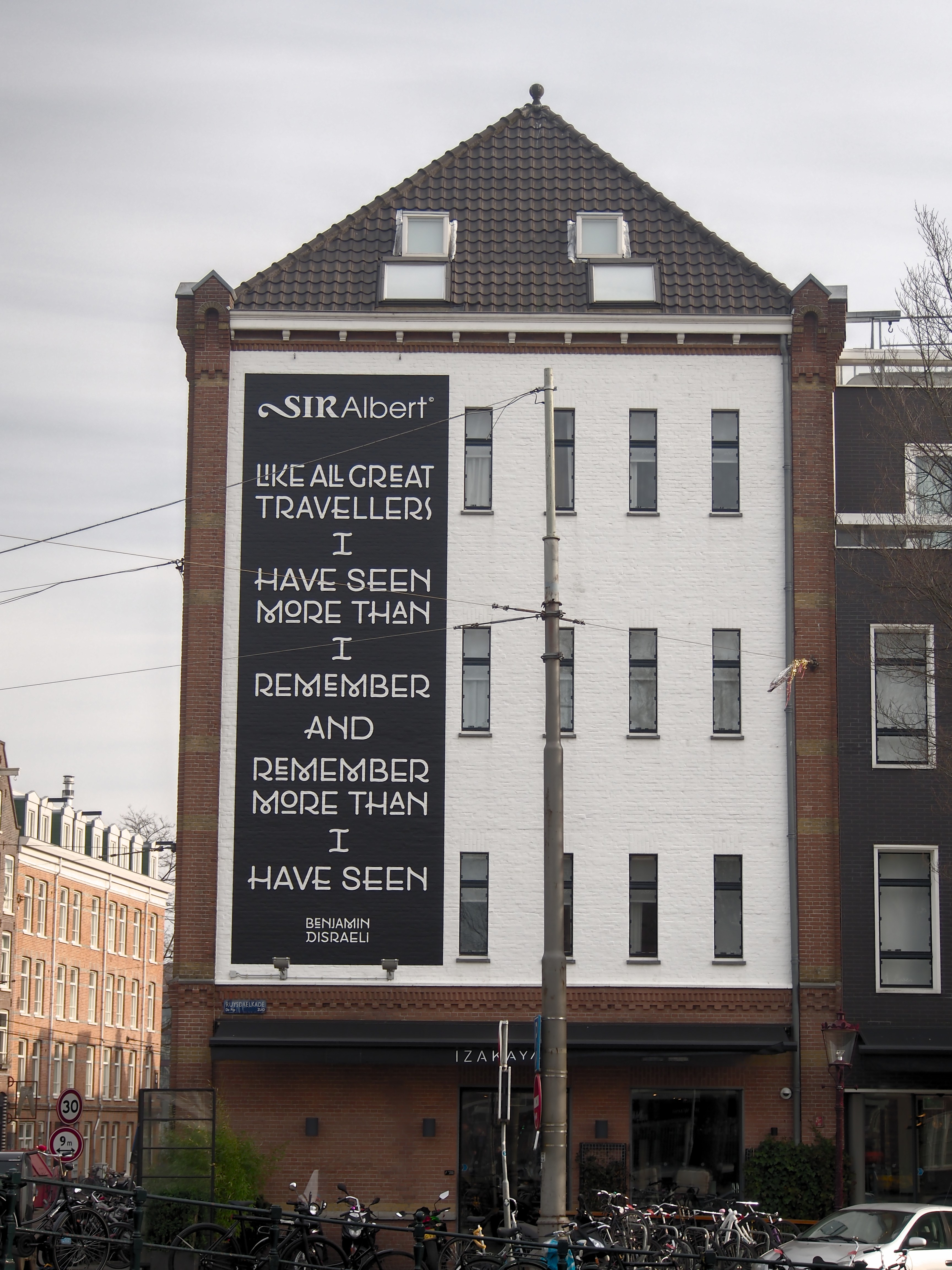 Gedicht Sir Albert, Ruysdaelkade hoek Albert Cuypstraat